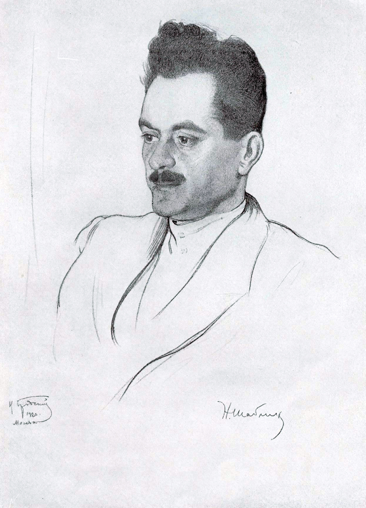 Шаблин, Николай